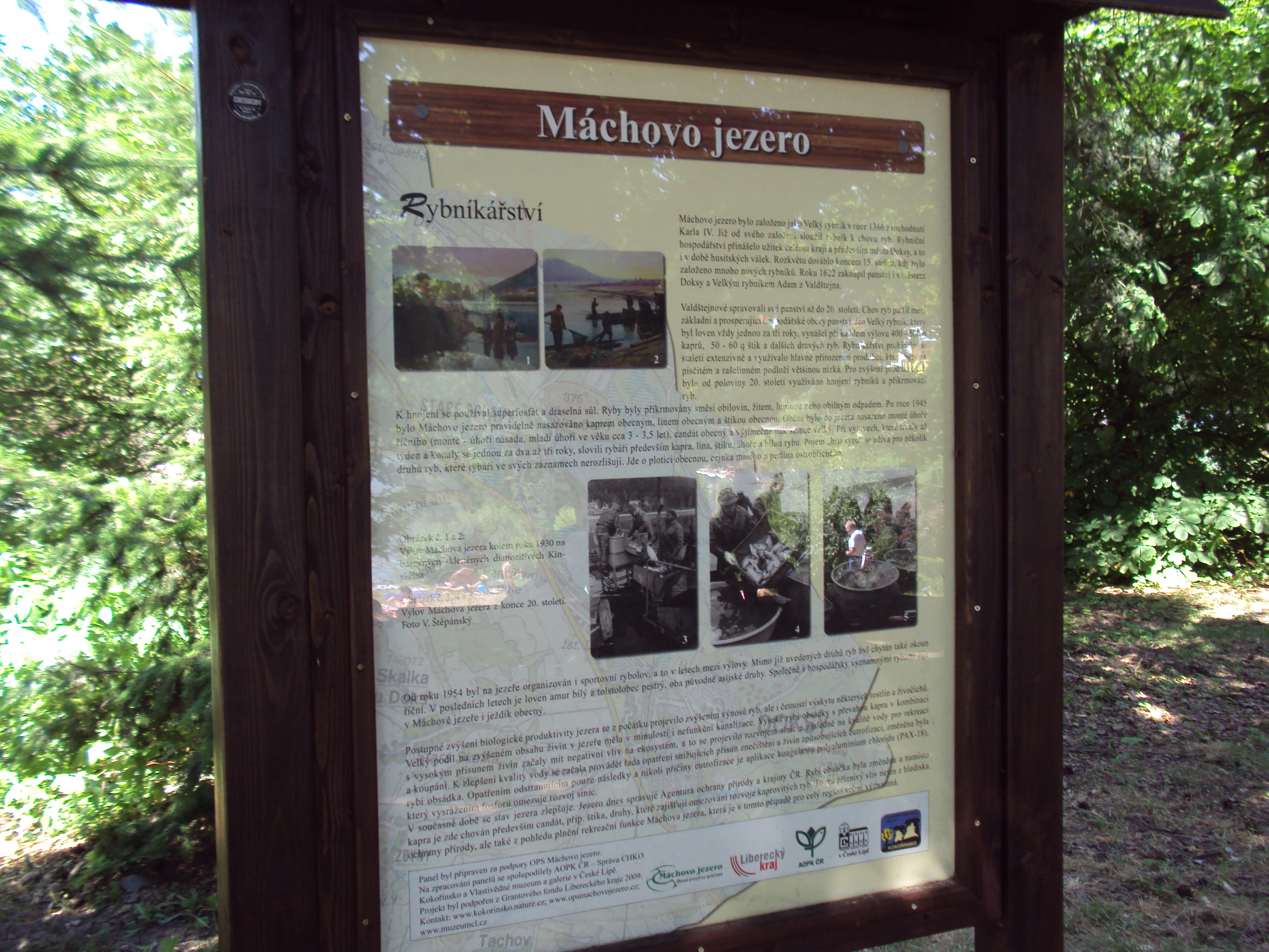 Infopanel na břehu Máchova jezera, na severním konci Starých Splavů